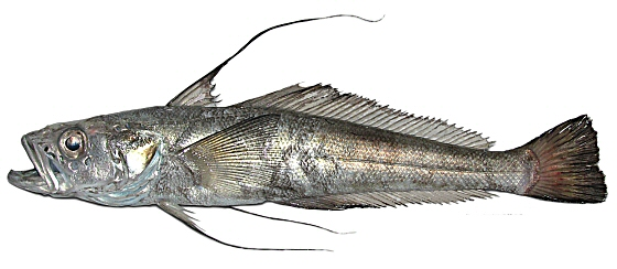 Aethotaxis mitopteryx, East Antarctica, 2010